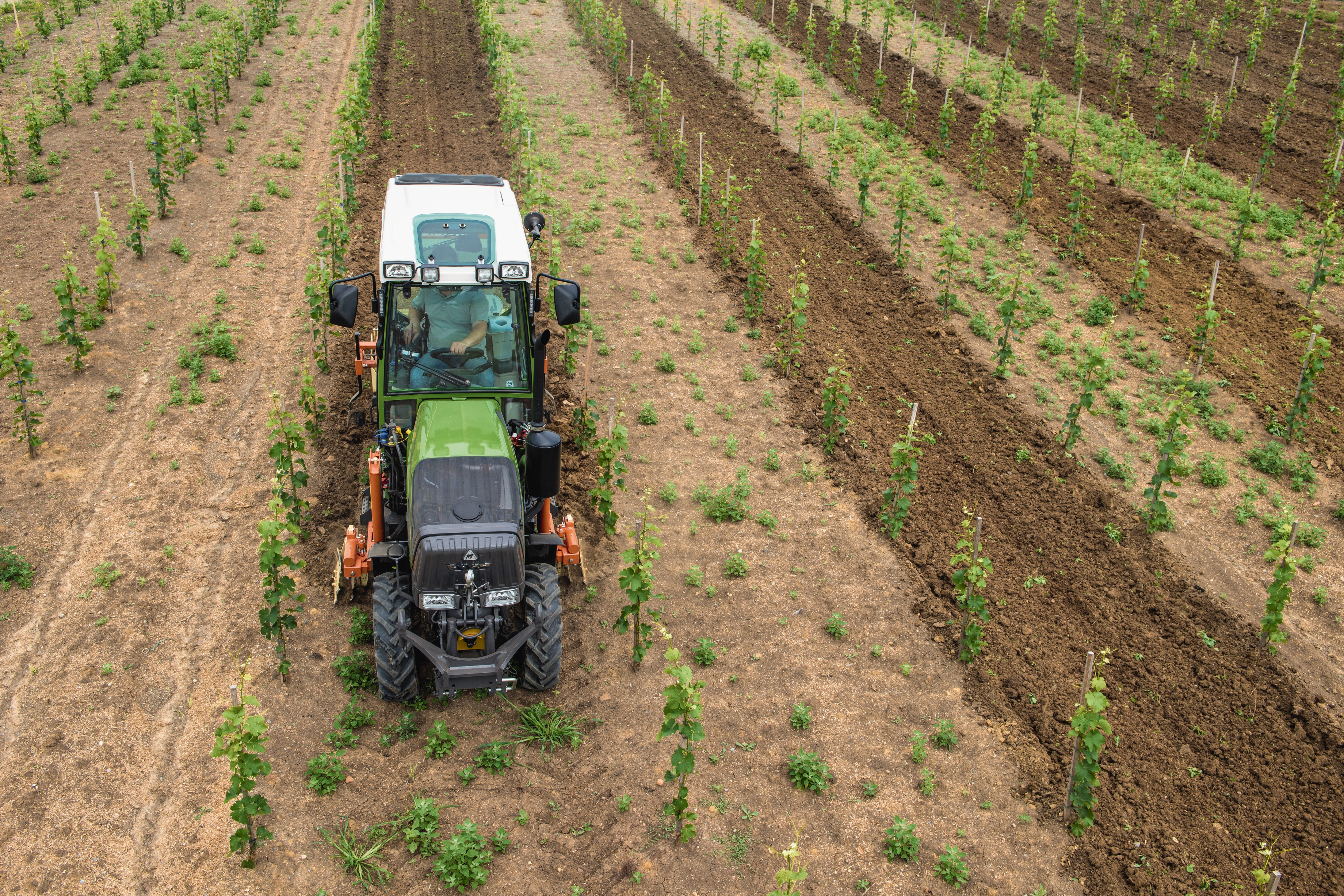 Fendt 200 V/F/P